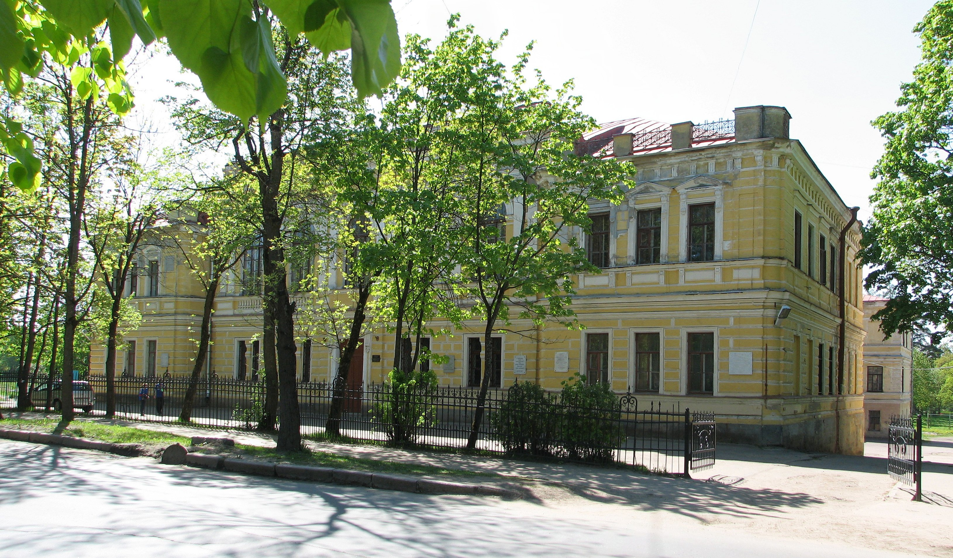 Школа № 4, Гатчина